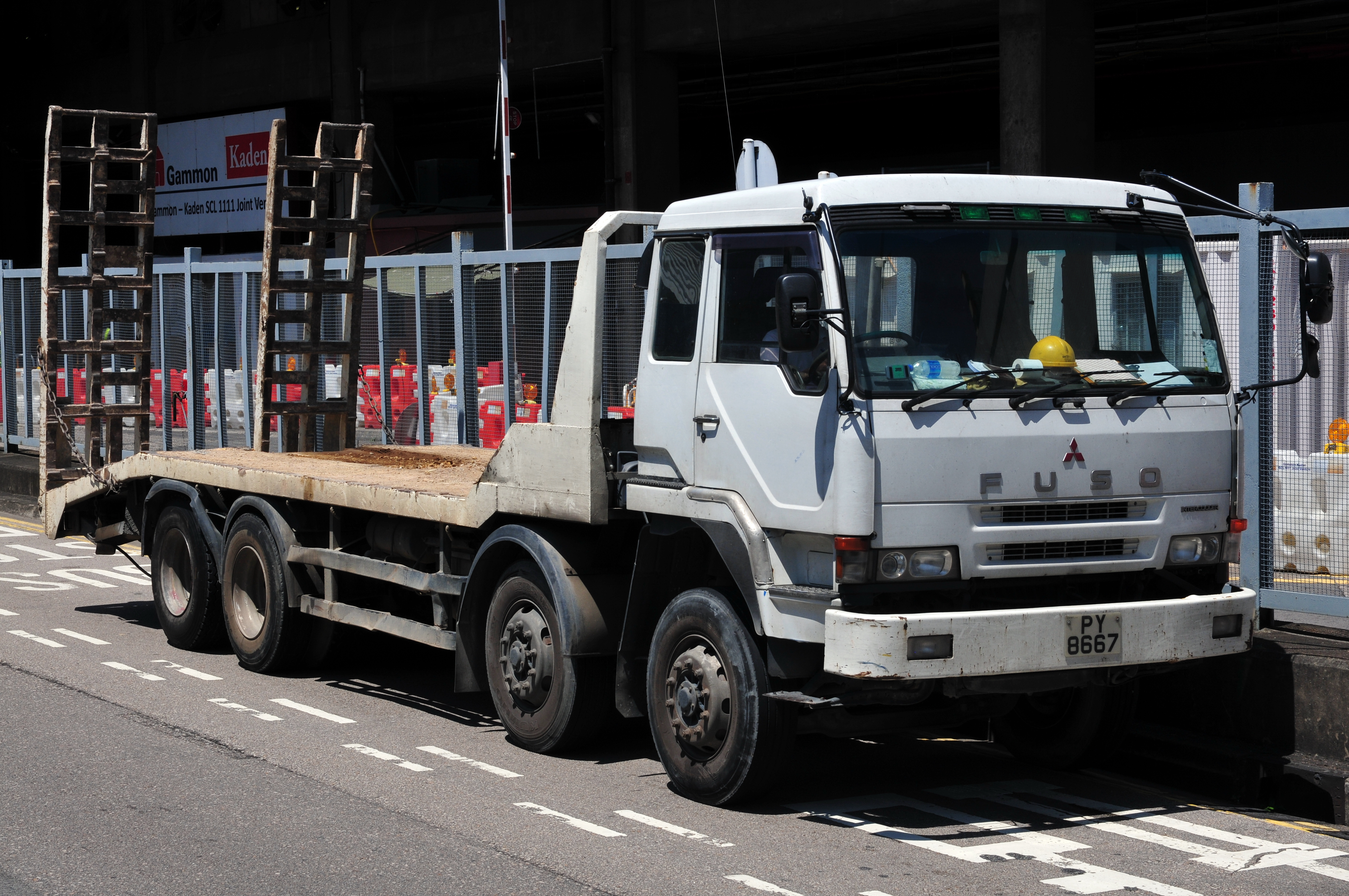 Wikimania 2013 Hongkong